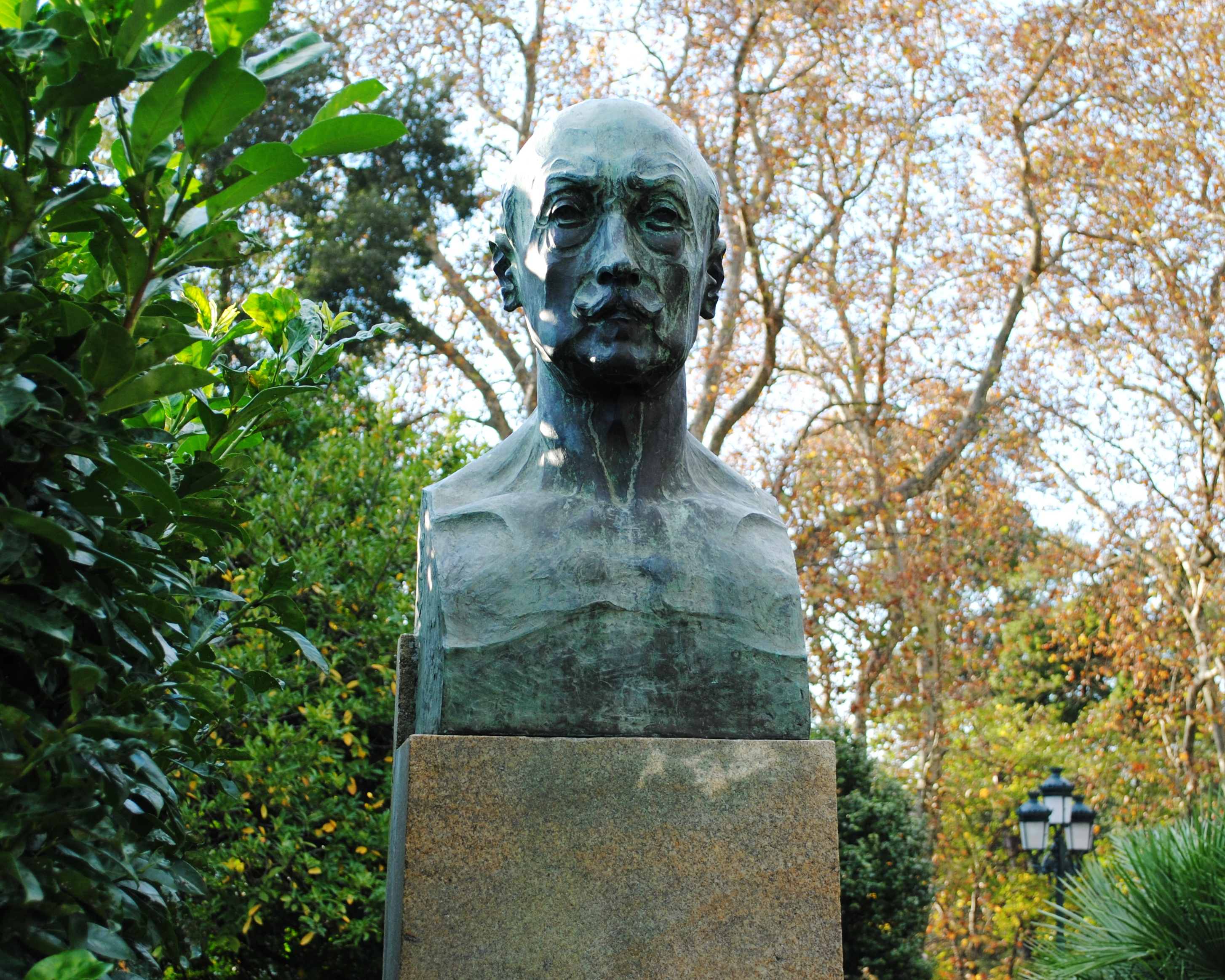 Fernando Quiñones de León polo escultor Santiago Rodríguez Bonome no Paseo Ángel Ilarri de Vigo.